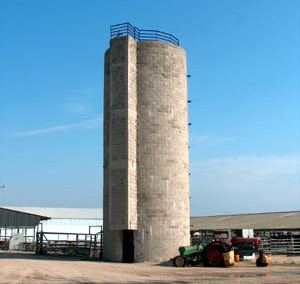 מגדל תחמיץ (סילו) בקבוצת יבנה